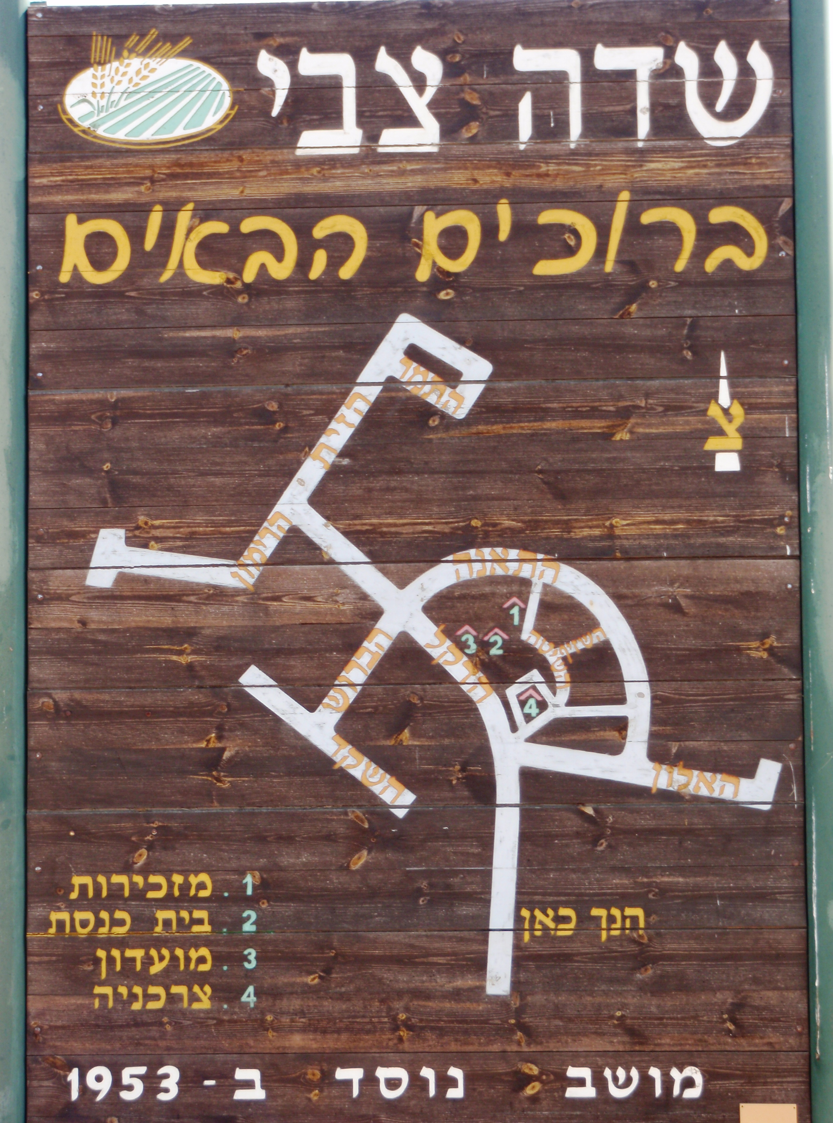 הכניסה למושב שדה צבי.